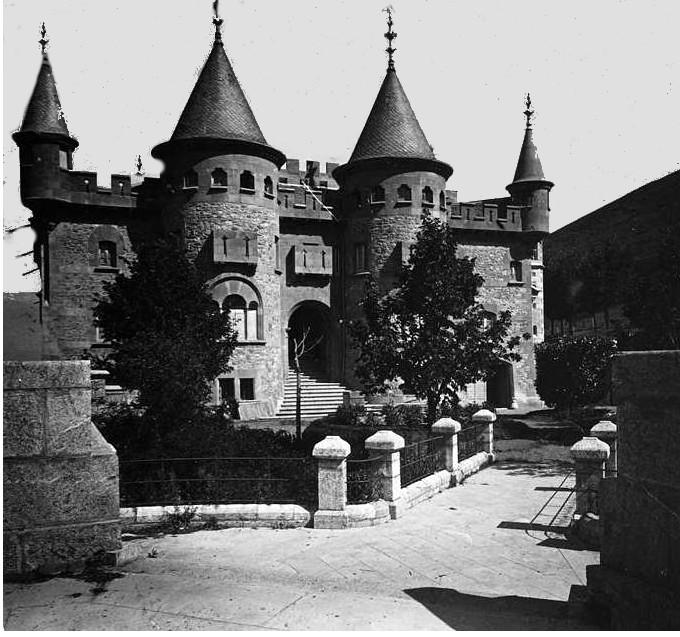 Vista del castell del Riu d ' Alp. Josep Salvany i Blanch (1924)